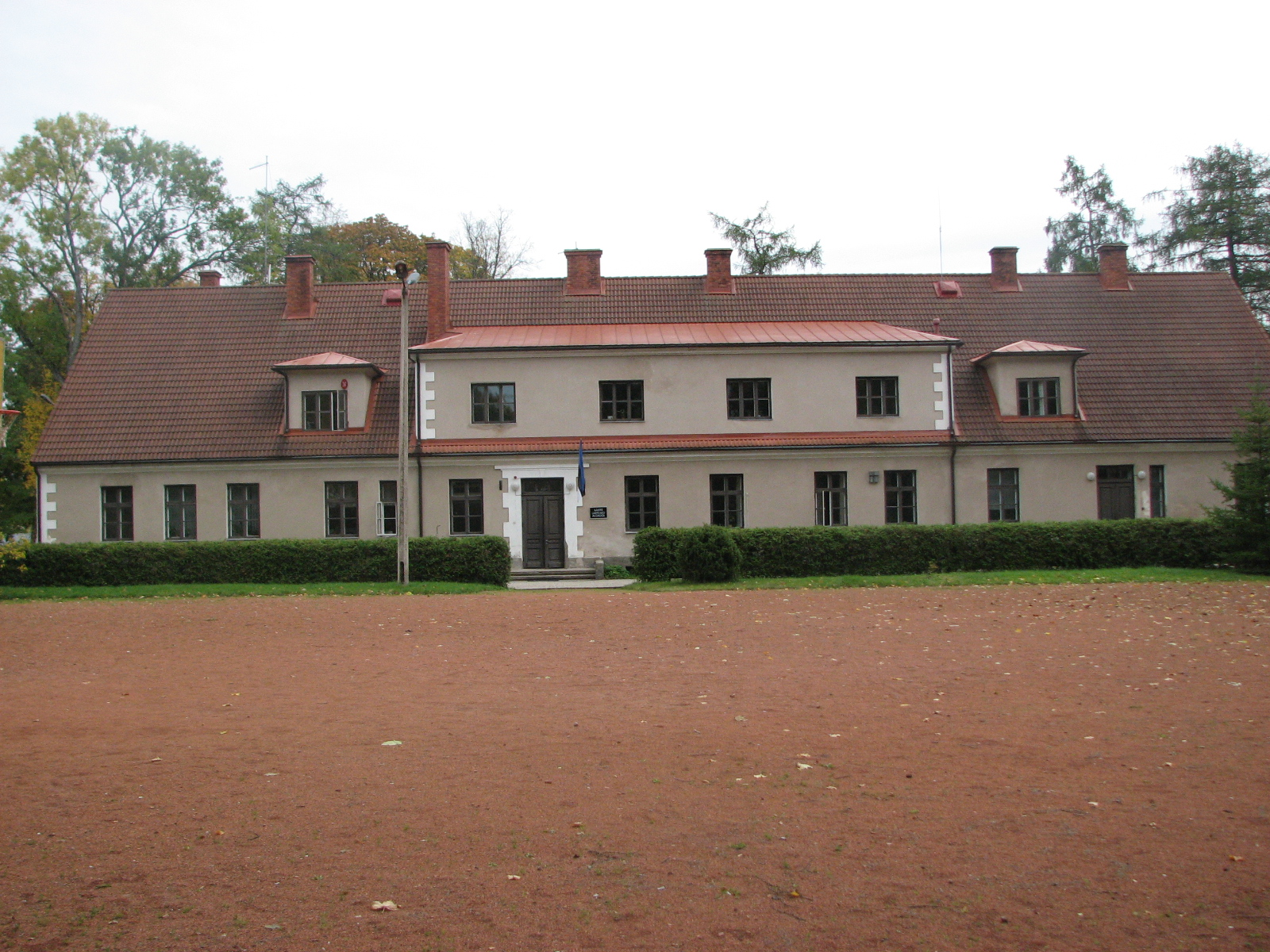 Aakre manor, Estonia